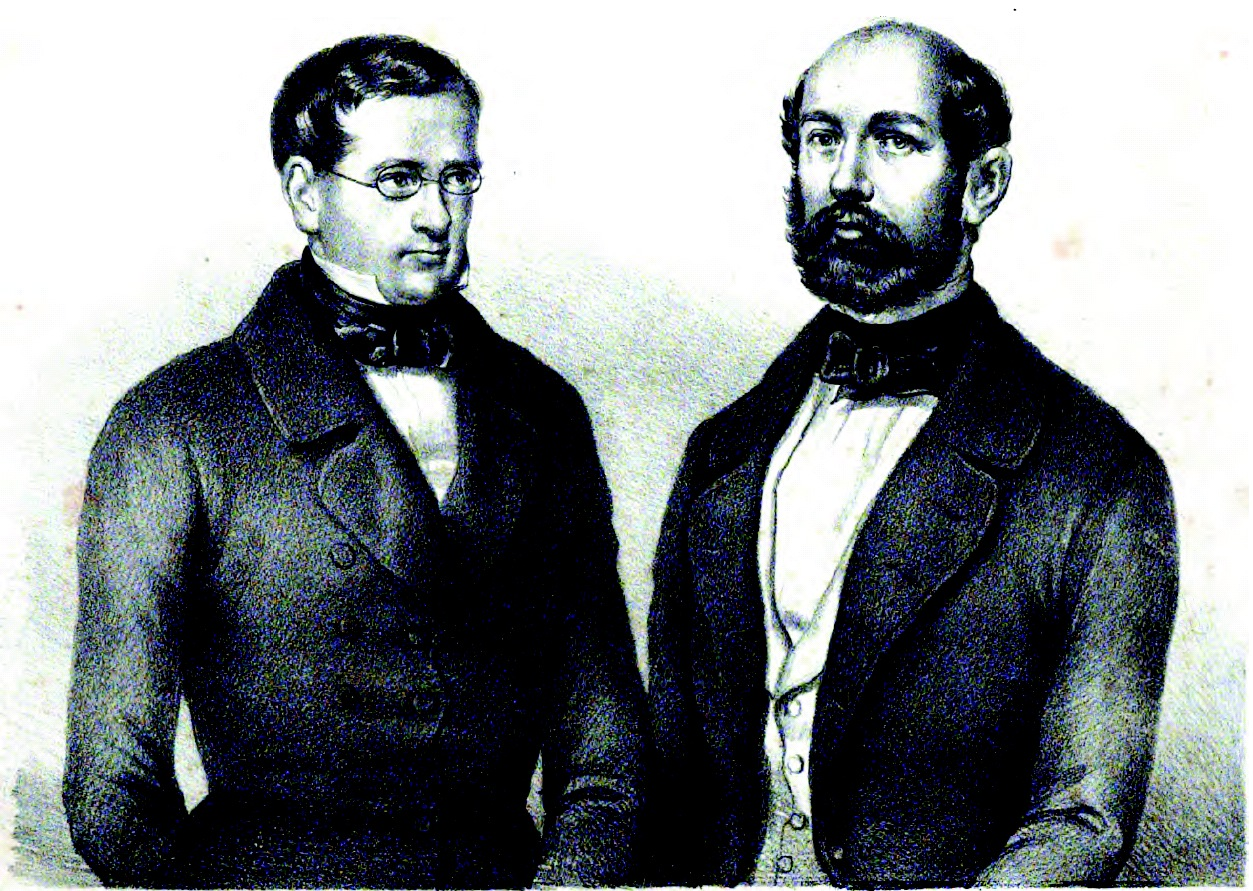 Otto Theodor Baron v. Manteuffel, Maximilian Graf v. Hatzfeld, K. Preussische Bevollmächtigte